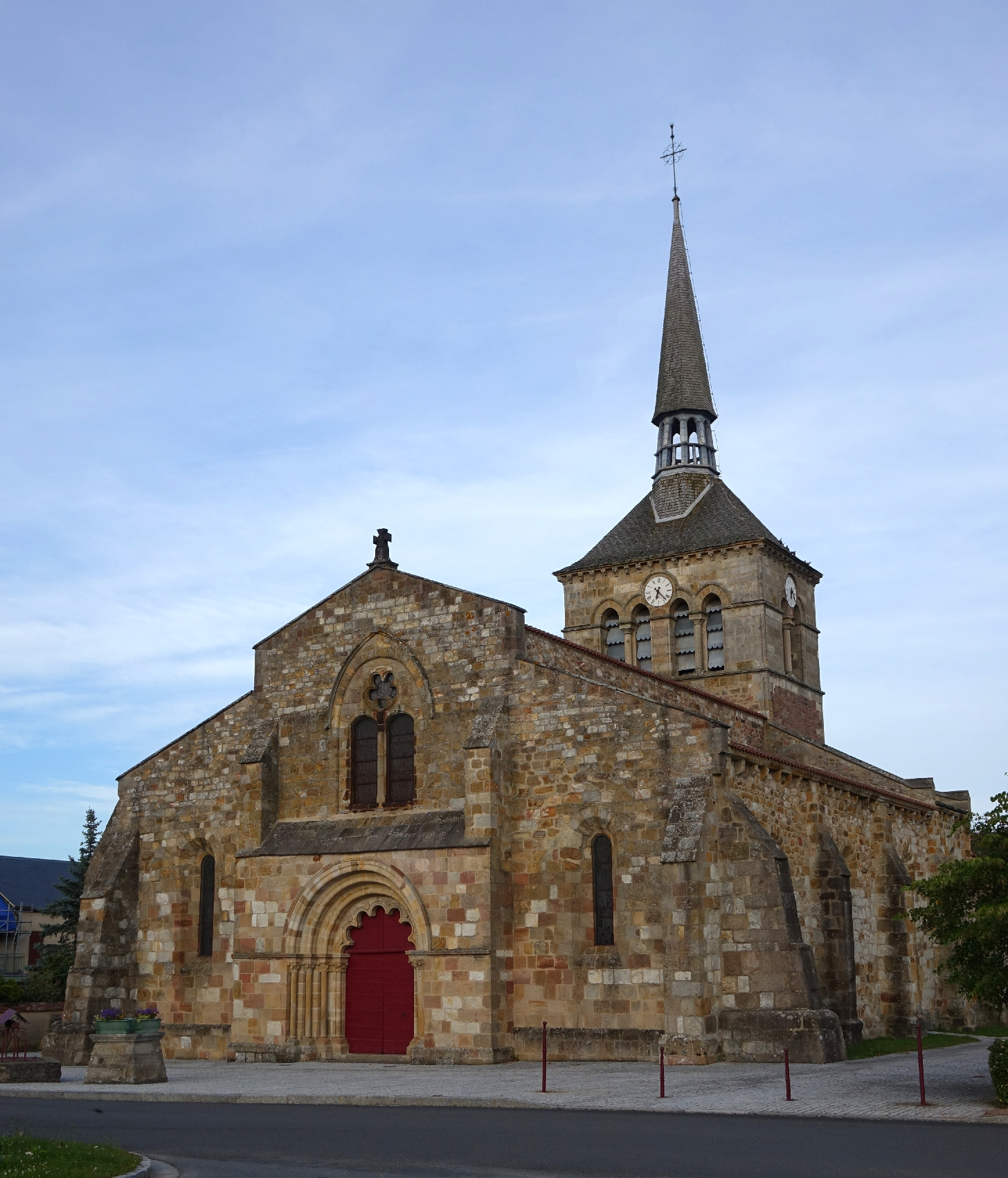 Église Saint-Prejet